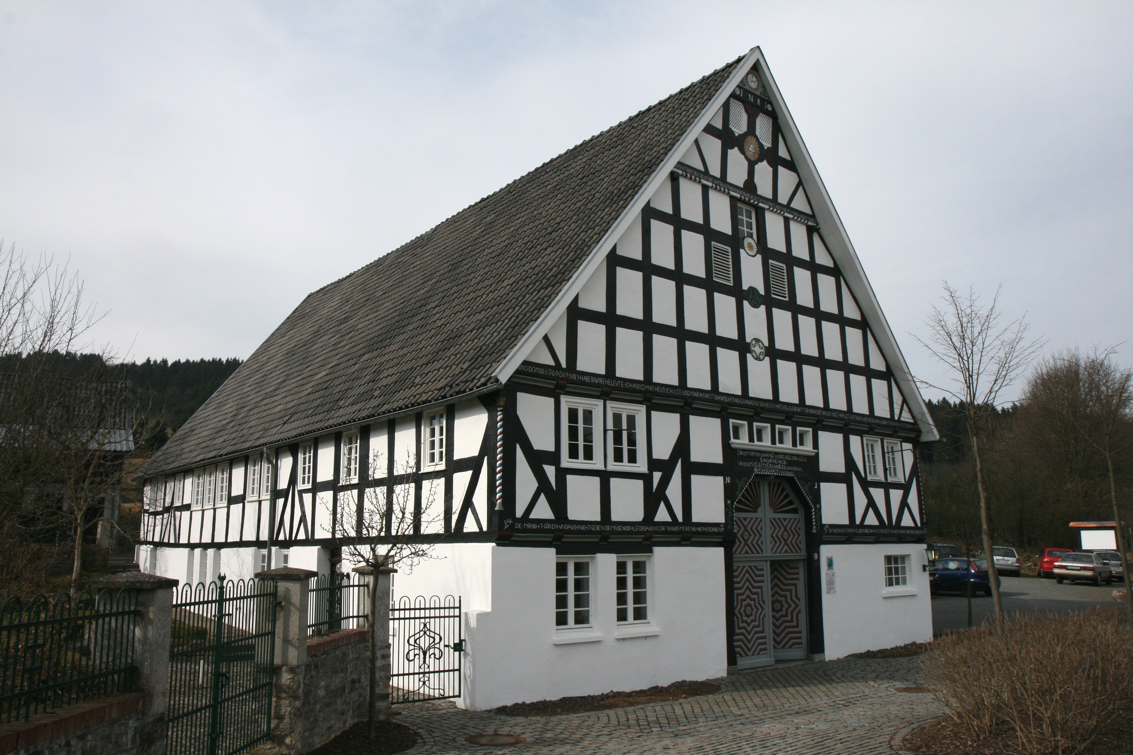 Stertschultenhof in Eslohe-Cobbenrode, Olper Str. 3.